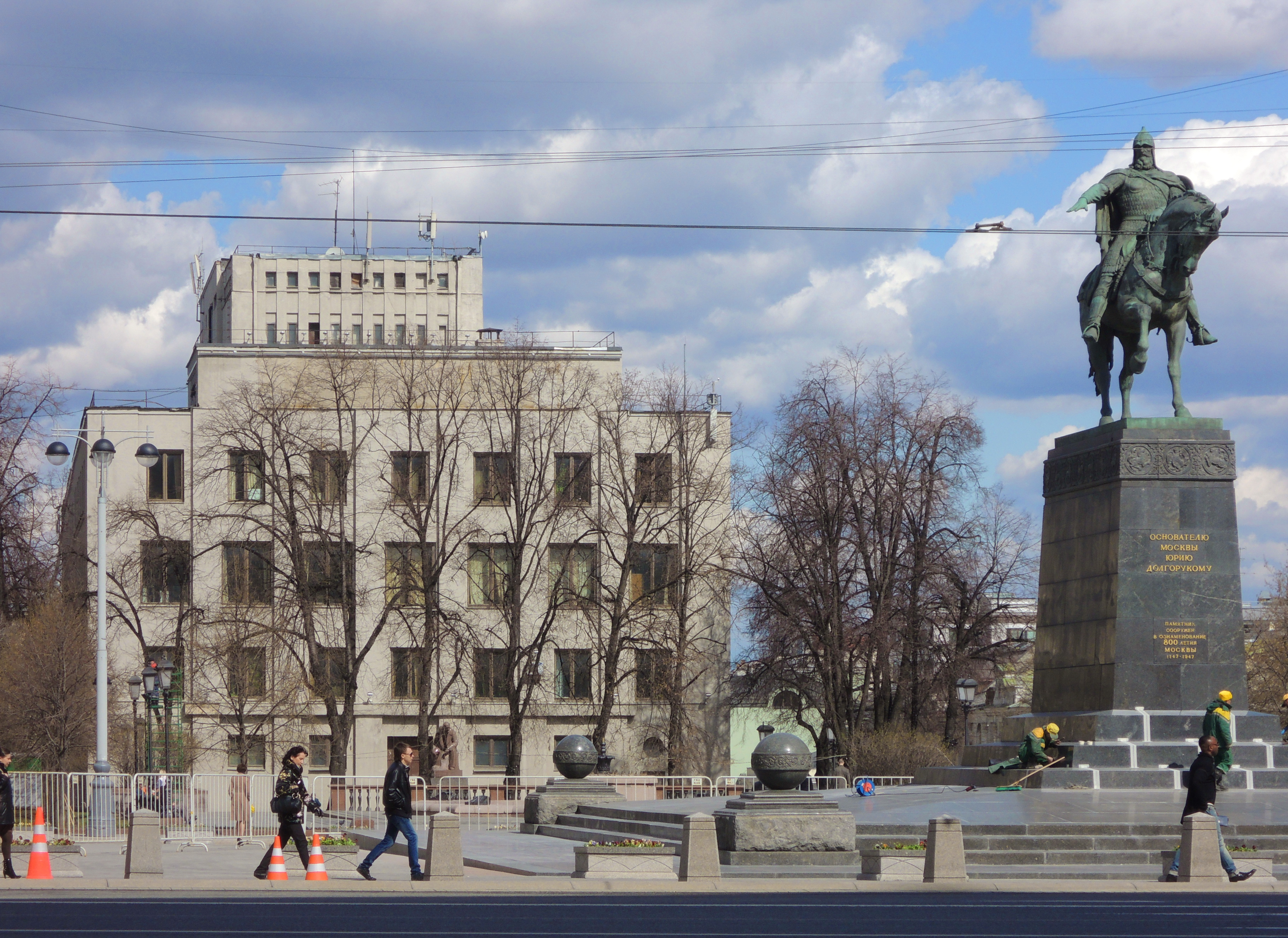 Тверская улица